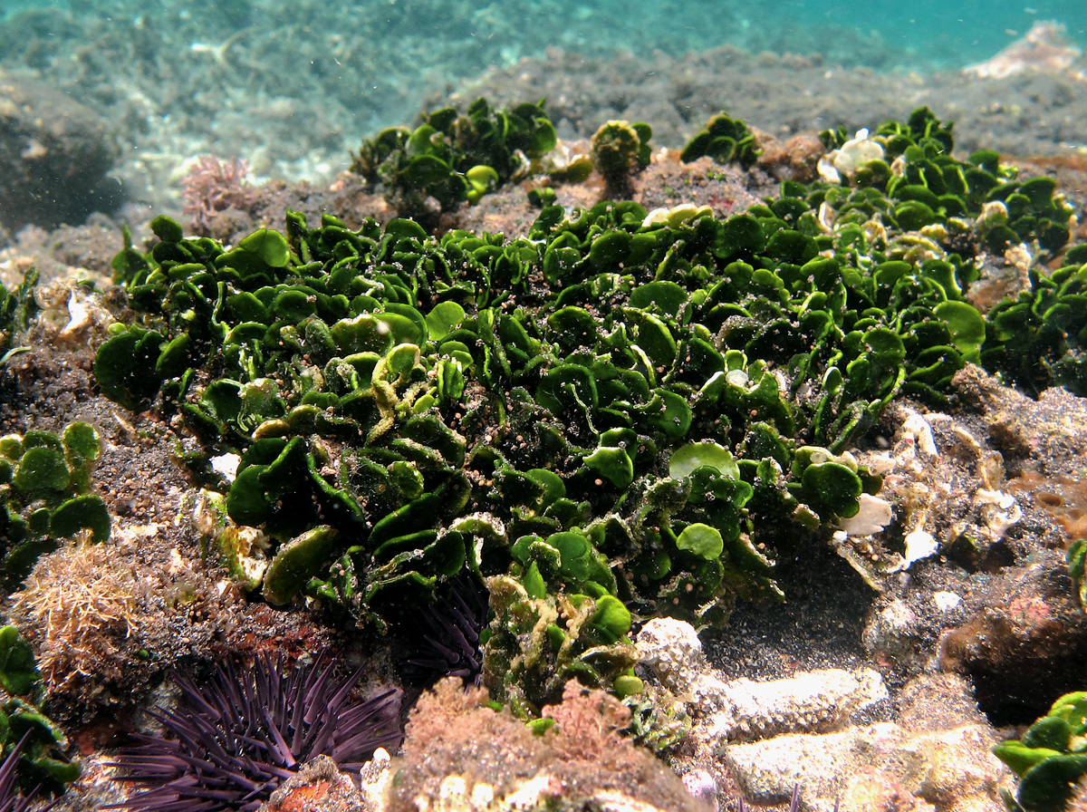 L'algue Halimeda tuna à la Réunion.